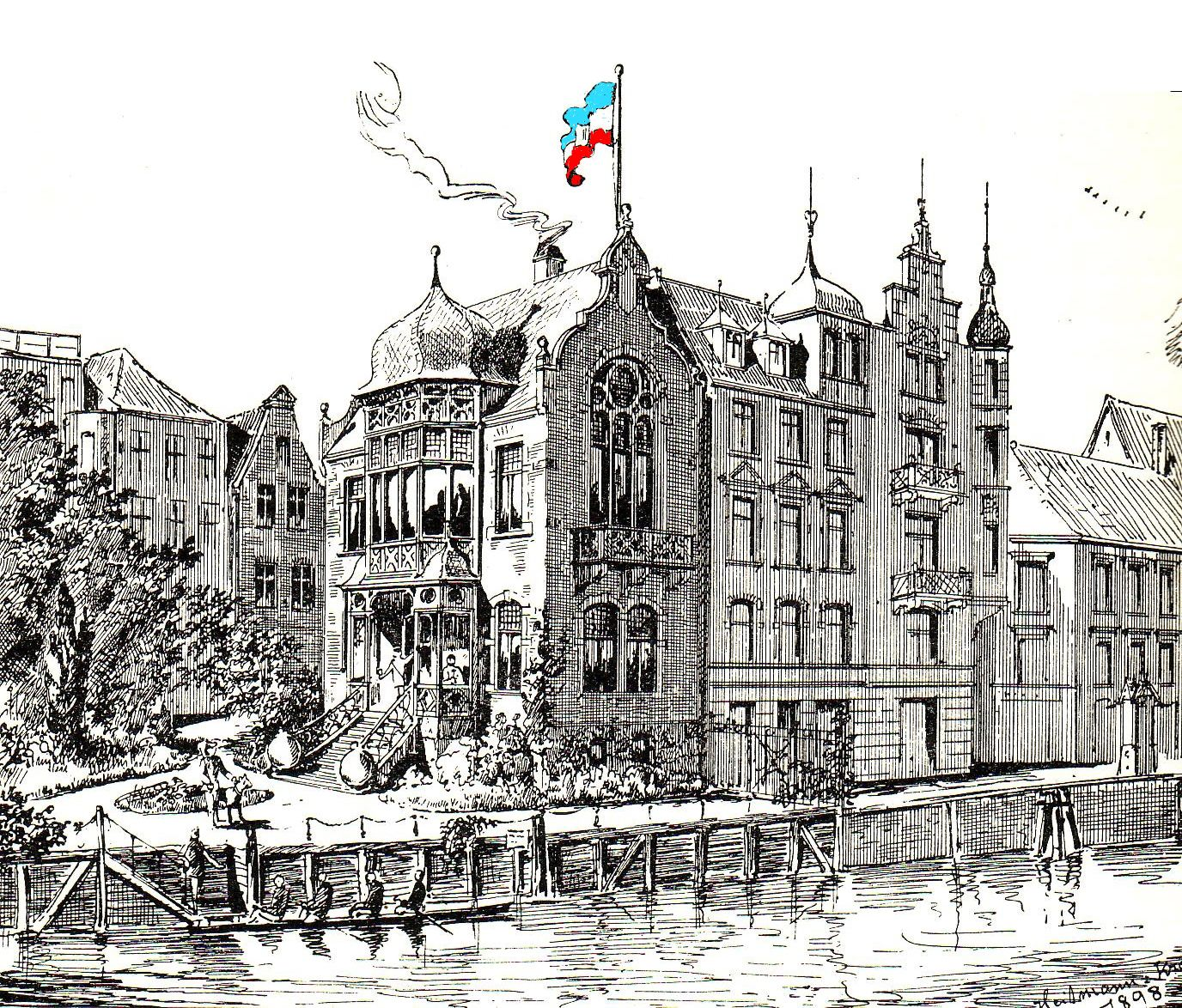 Masovias erstes Corpshaus (1898-1929) auf der Dominsel in Königsberg (2. v. li.).